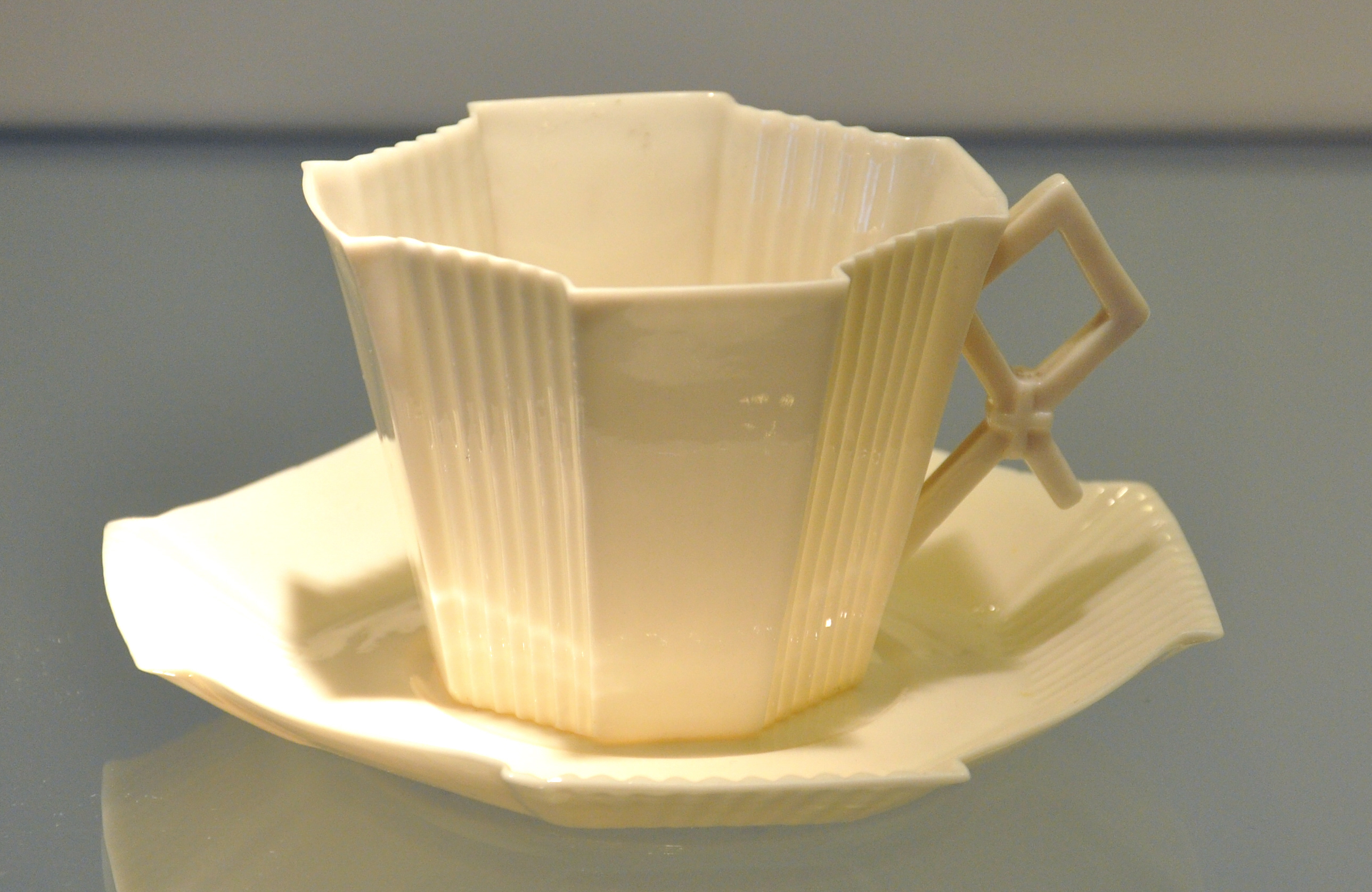 Tasse mit Untertasse, Manufaktur Fermanagh, Nordirland, um 1925; Knochenporzellan; Museum für Angewandte Kunst, Frankfurt am Main, Inv. Nr. 13817a,b